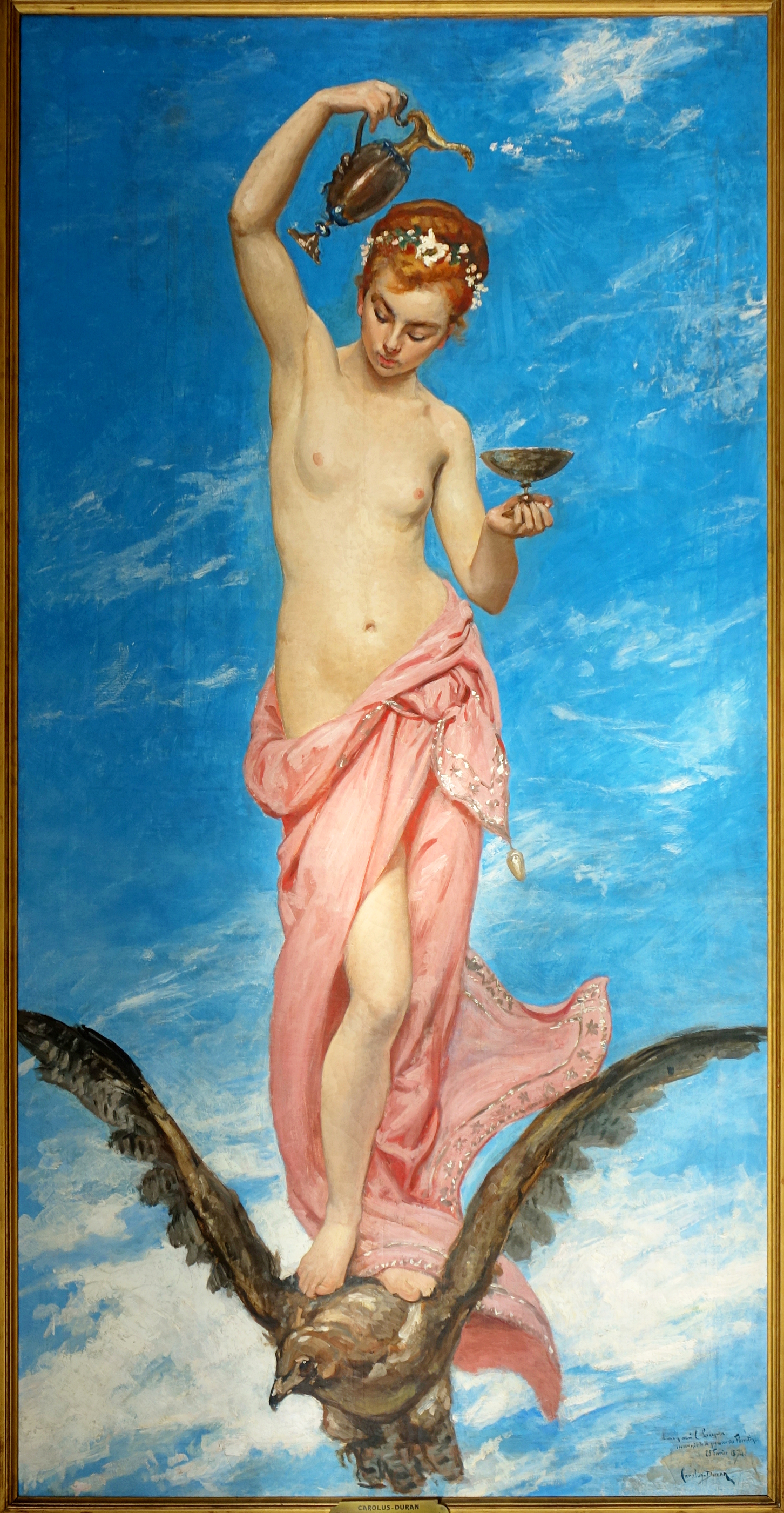 Hébé